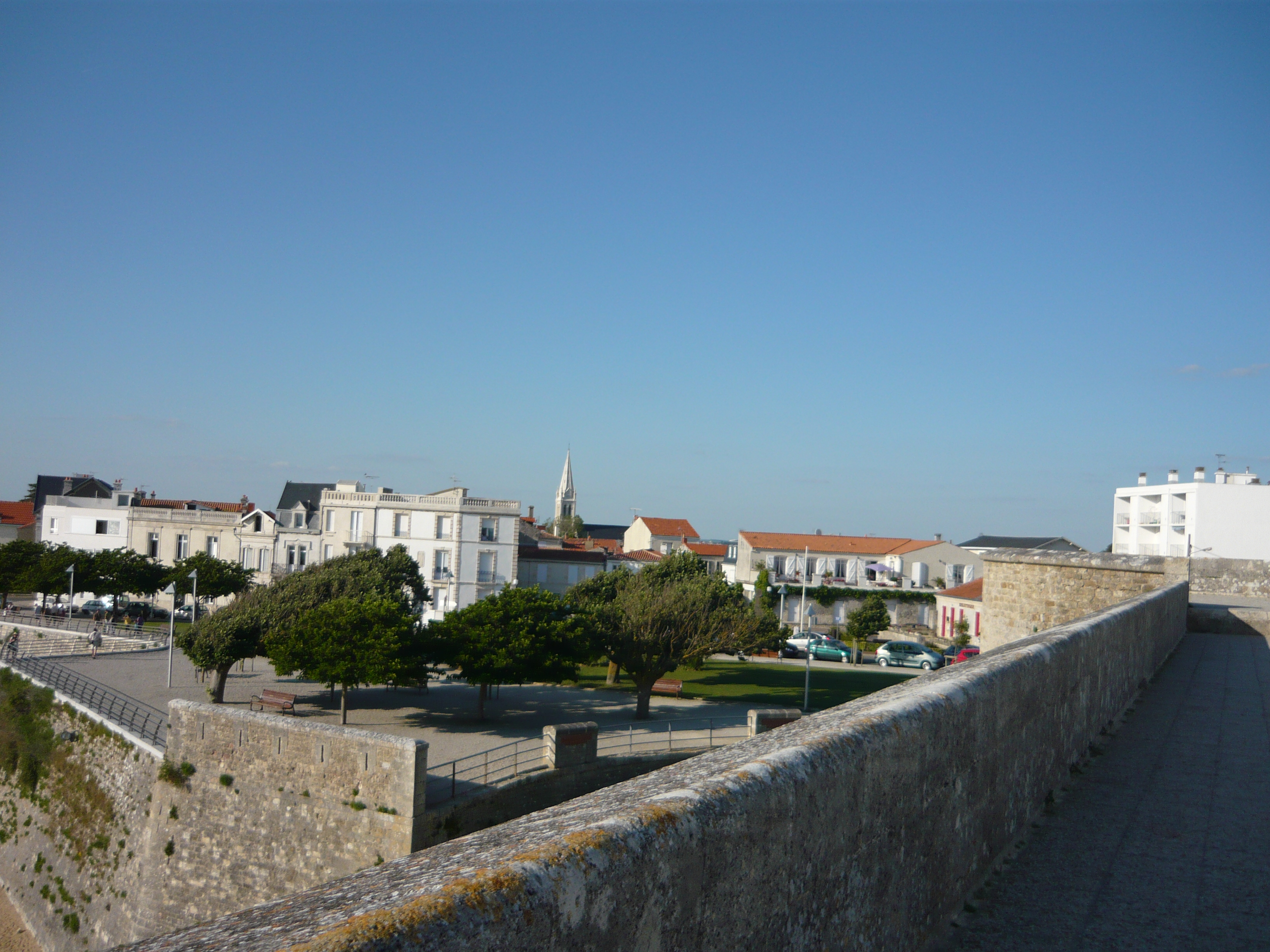 Vue sur la ville de Fouras depuis le site du Donjon (17).